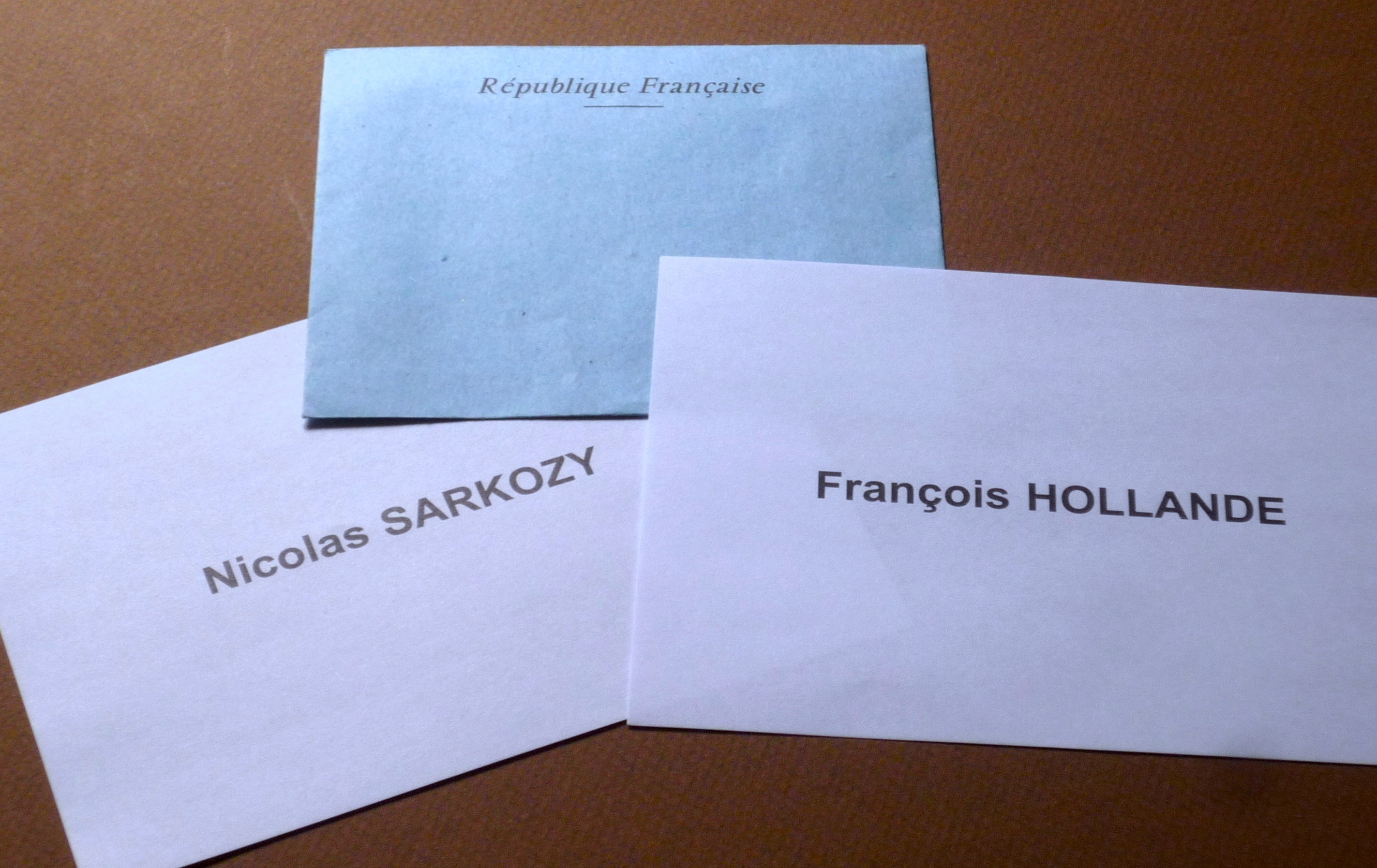 France Présidentielles 6 mai 2012 bulletins de vote second tour